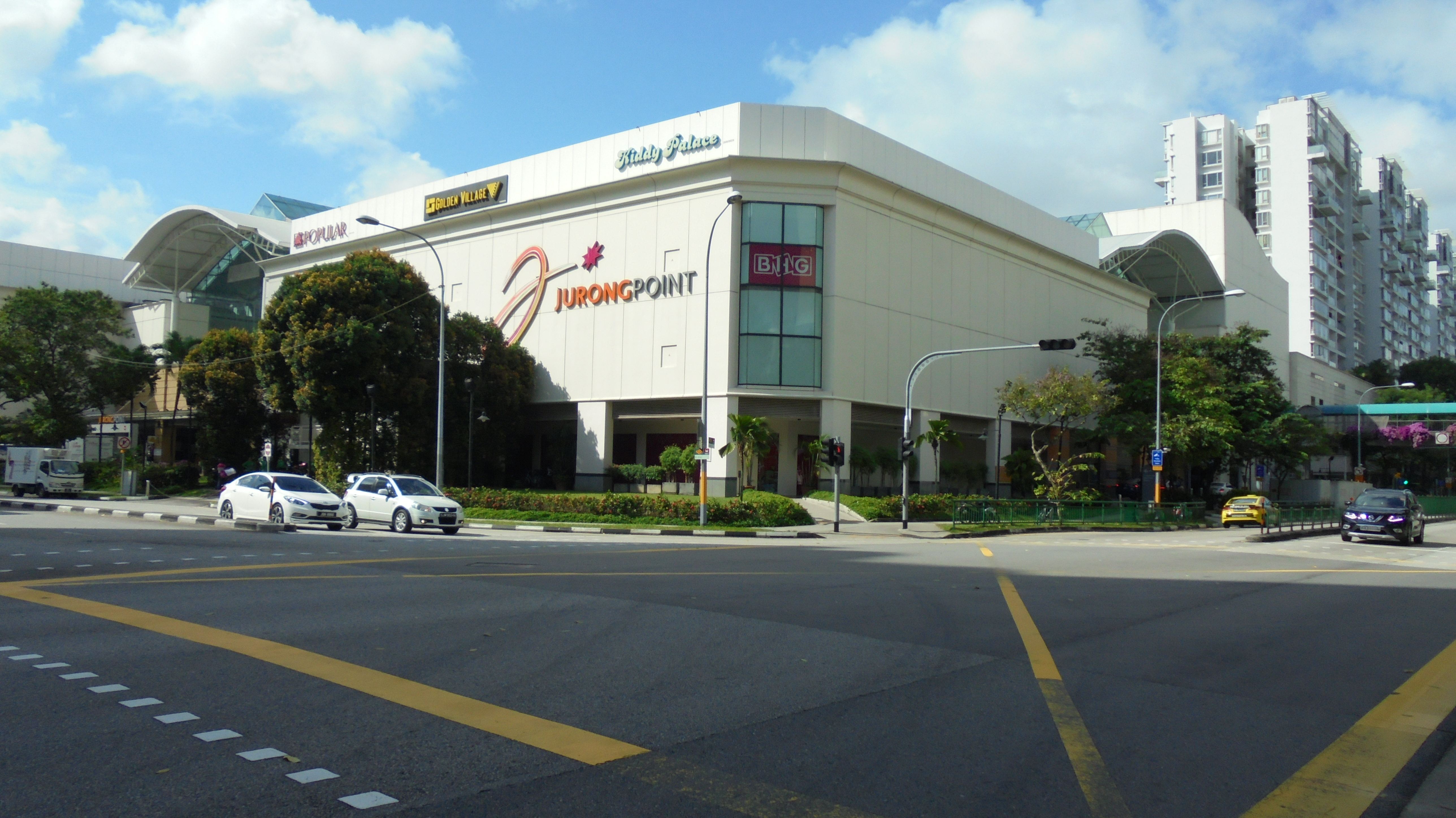 Jurong Point